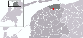 Locatie van Dokkum.